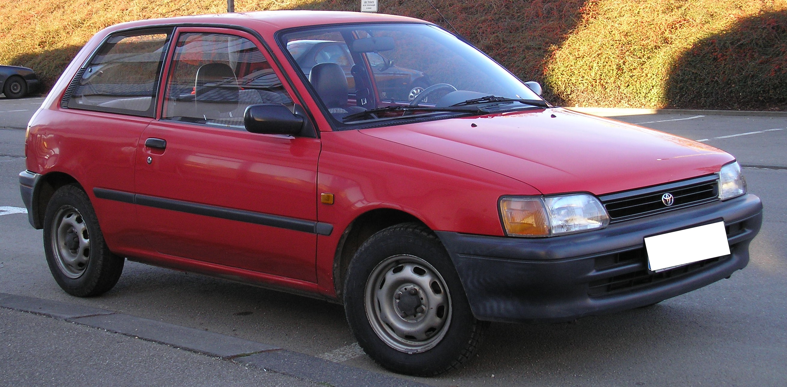 1990-1995 Toyota Starlet 1.3 XLi (EP81L-AGMNEC).